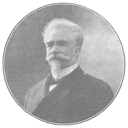 José Inocencio Arias. Retrato de cuando fue nombrado gobernador de la provincia.